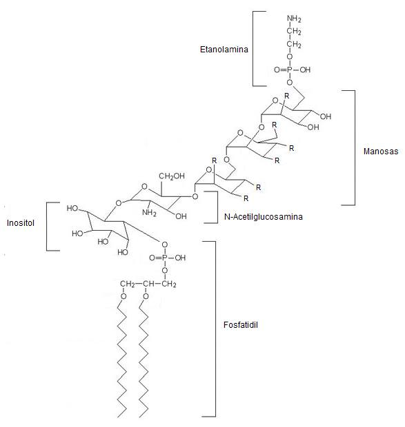 Imagen general GPI